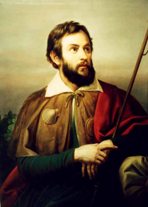 Gheorghe Tattarescu - Pelerin - Muzeul Municipiului Bucureşti